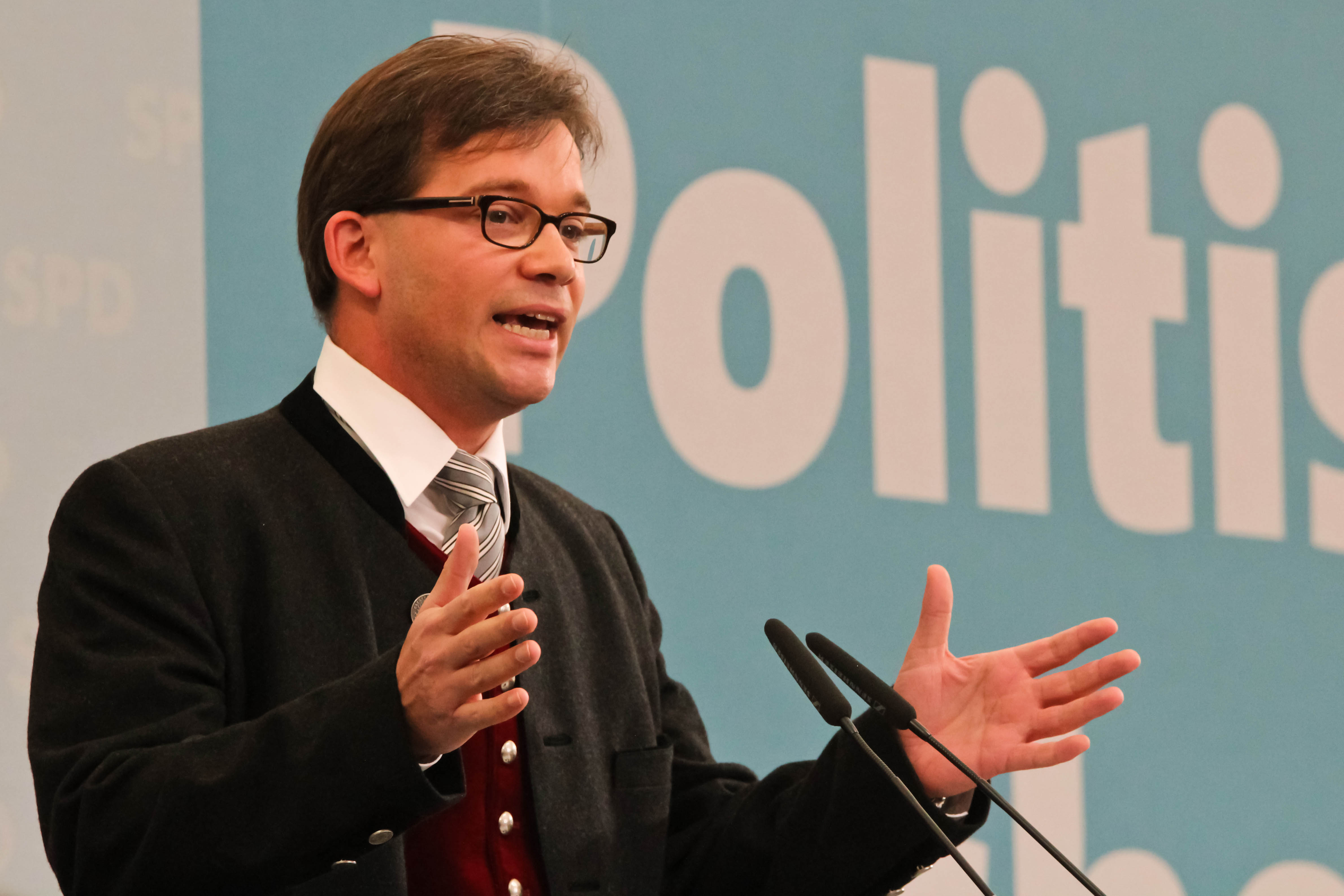 Florian Pronold beim politischen Aschermittwoch der BayernSPD in Vilshofen.